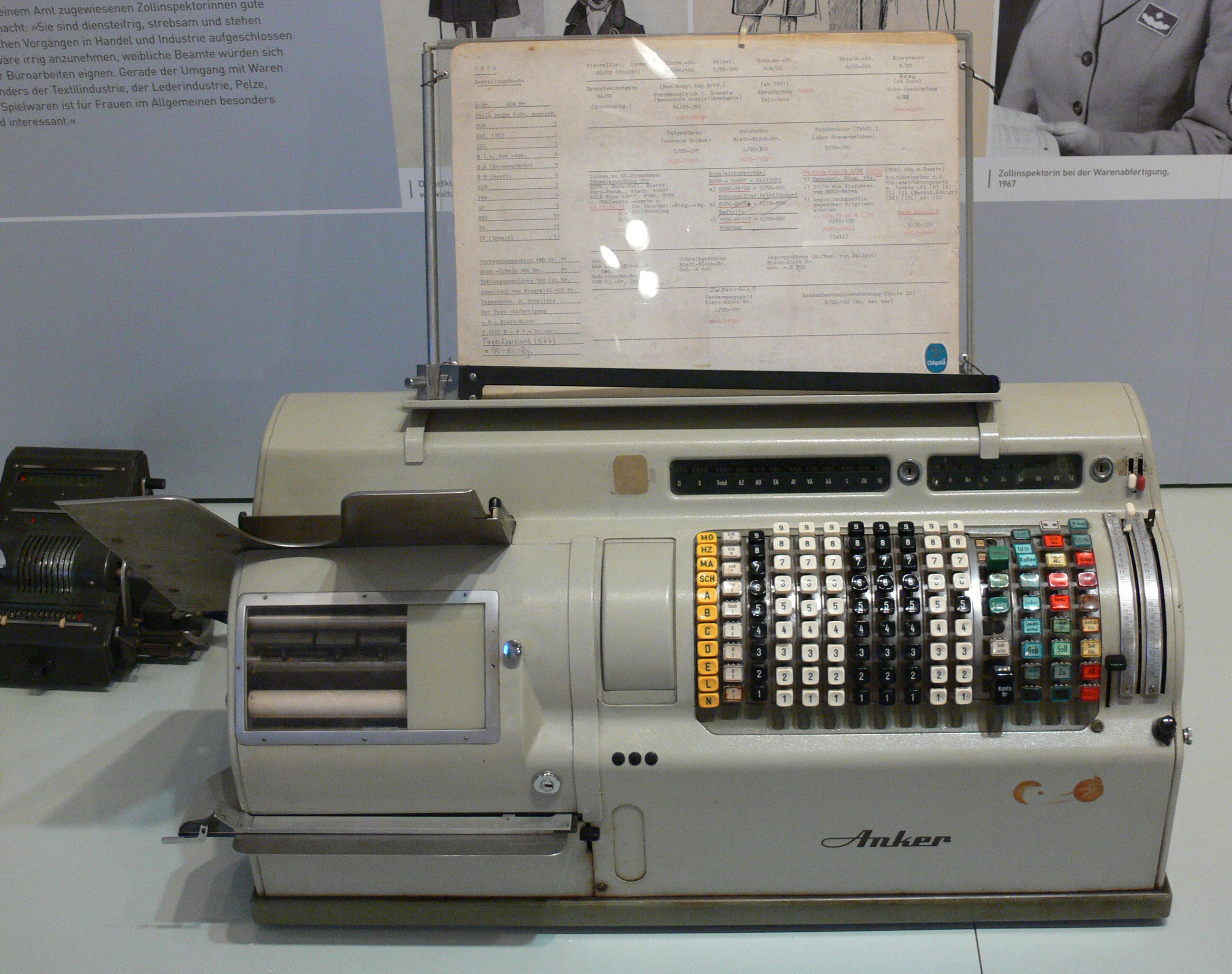 Hamburg, Deutsches Zollmuseum Buchungsautomat Anker BN 800 (bis 1990 das meistverwendete Kassenbuchungsgerät der Bundeszollverwaltung); Inv. Nr. DZM 1.005.076